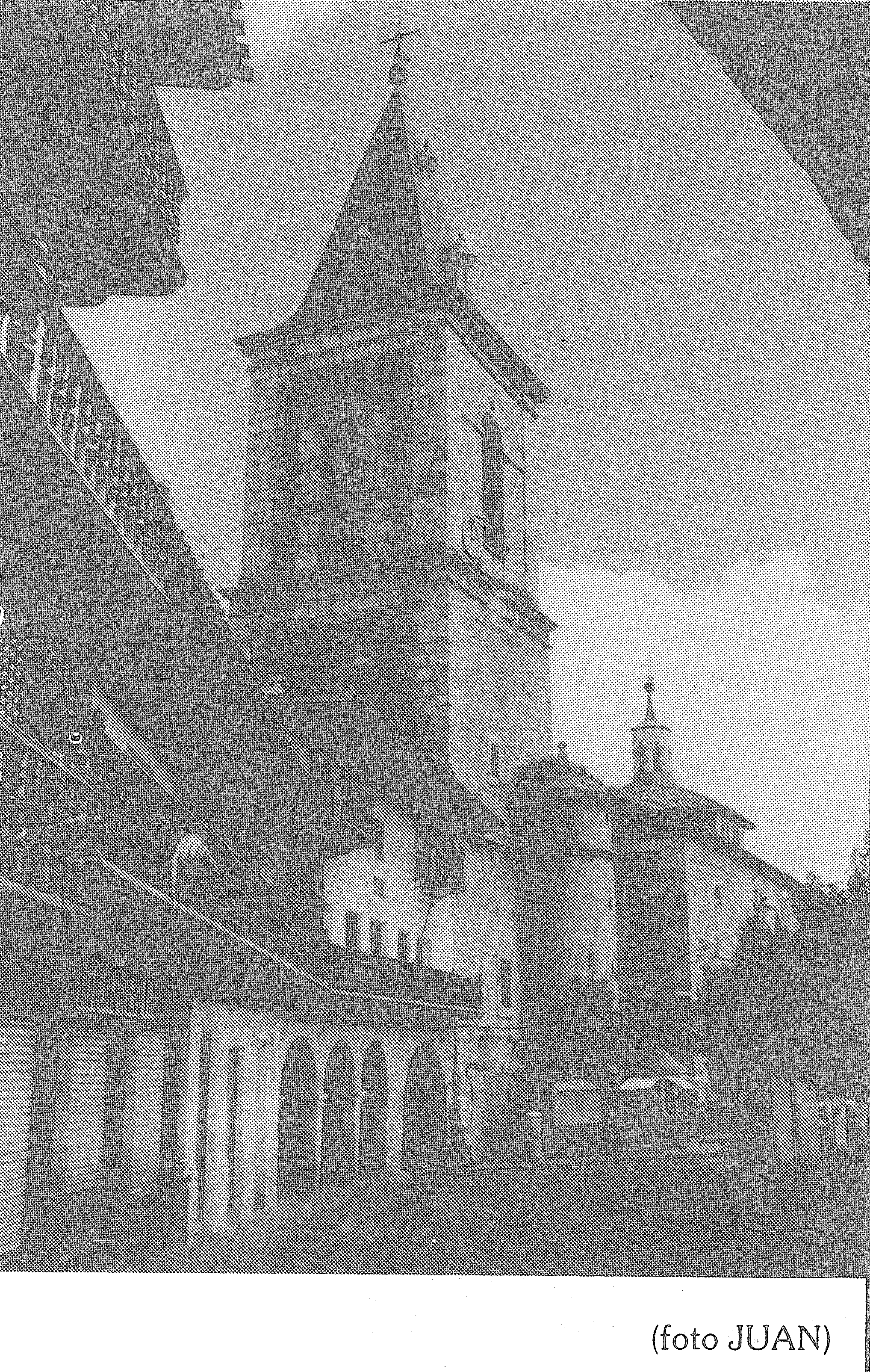 Home Valdemembra